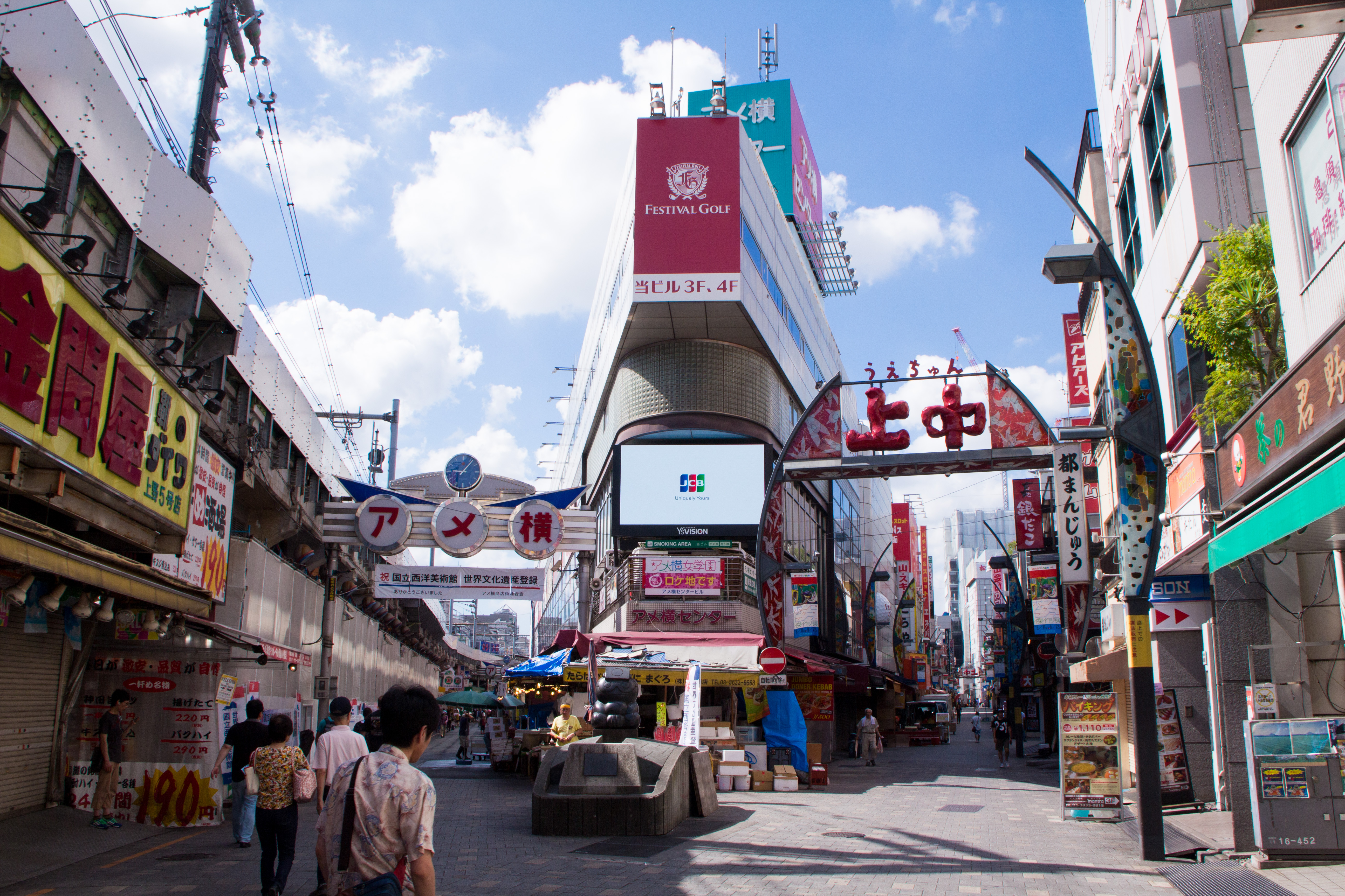 アメヤ横丁